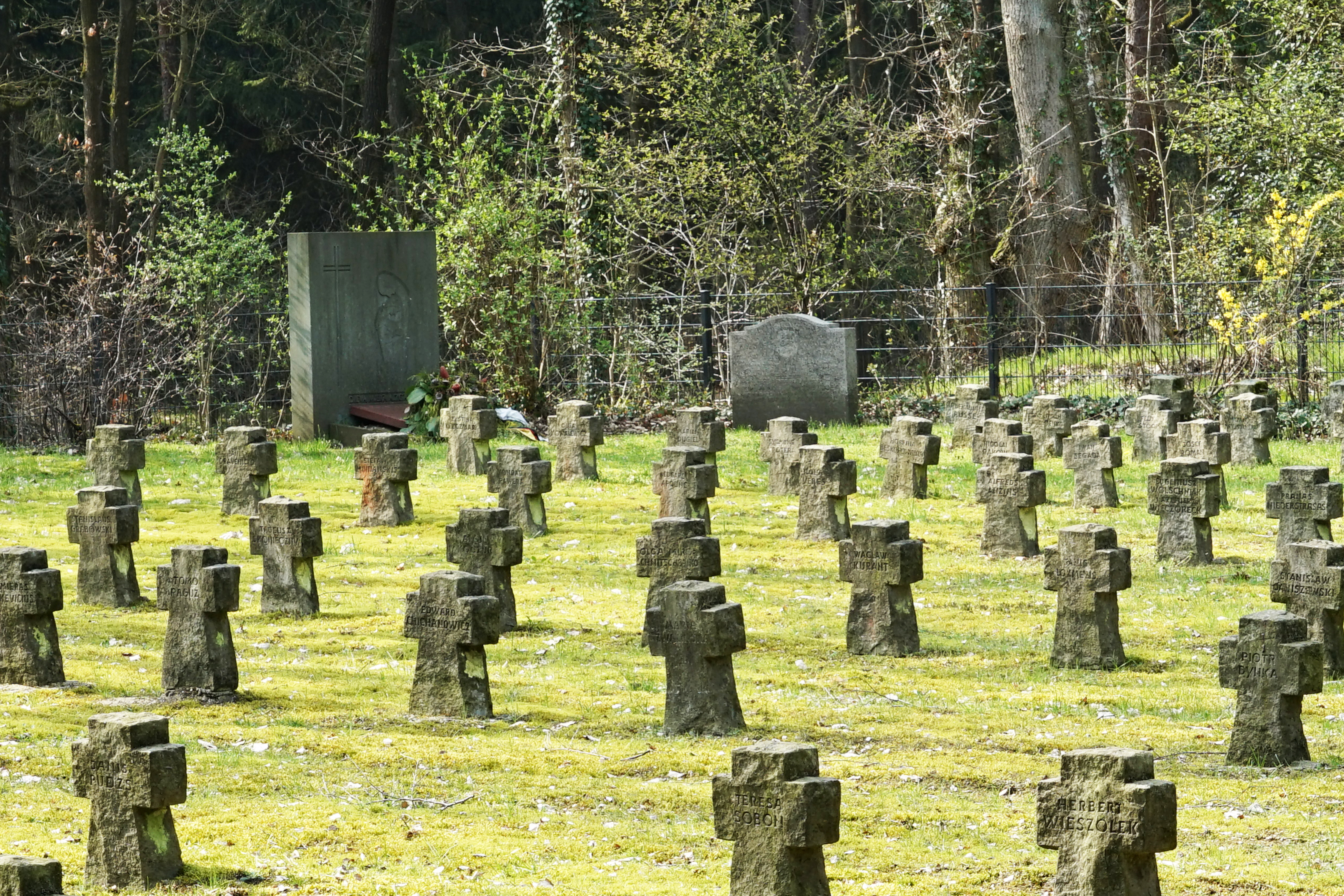 Kriegsgräberstätte Sannum Gedenksteine im April 2019